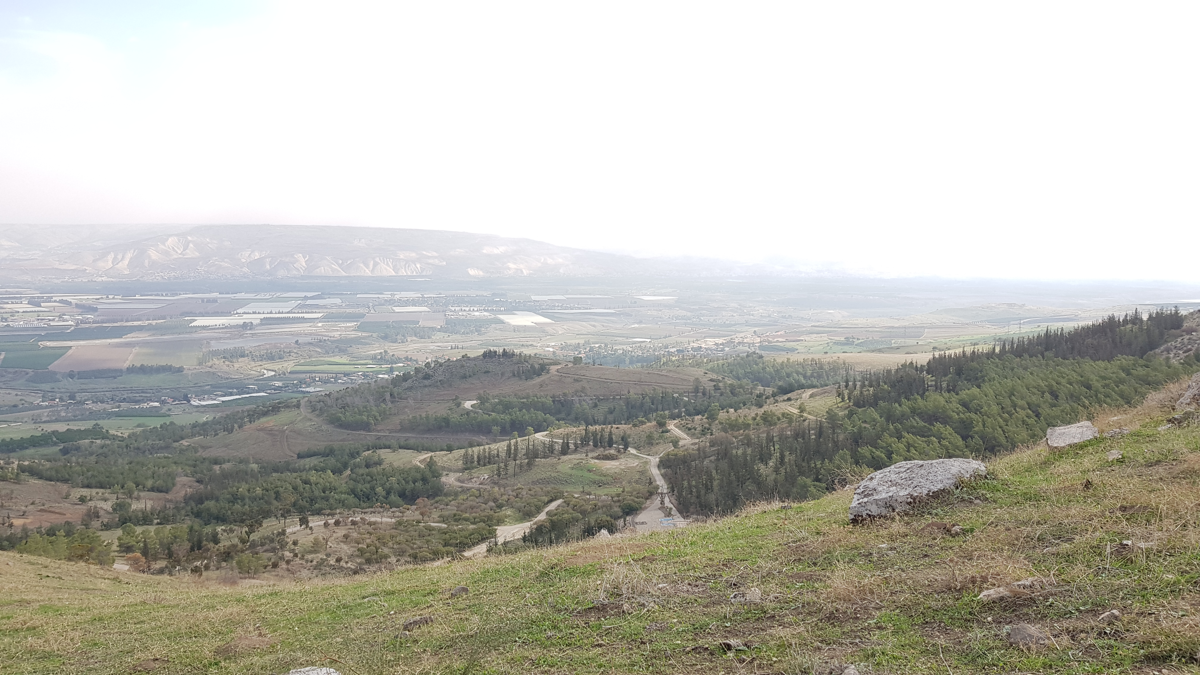 נוף יער מנחמיה1